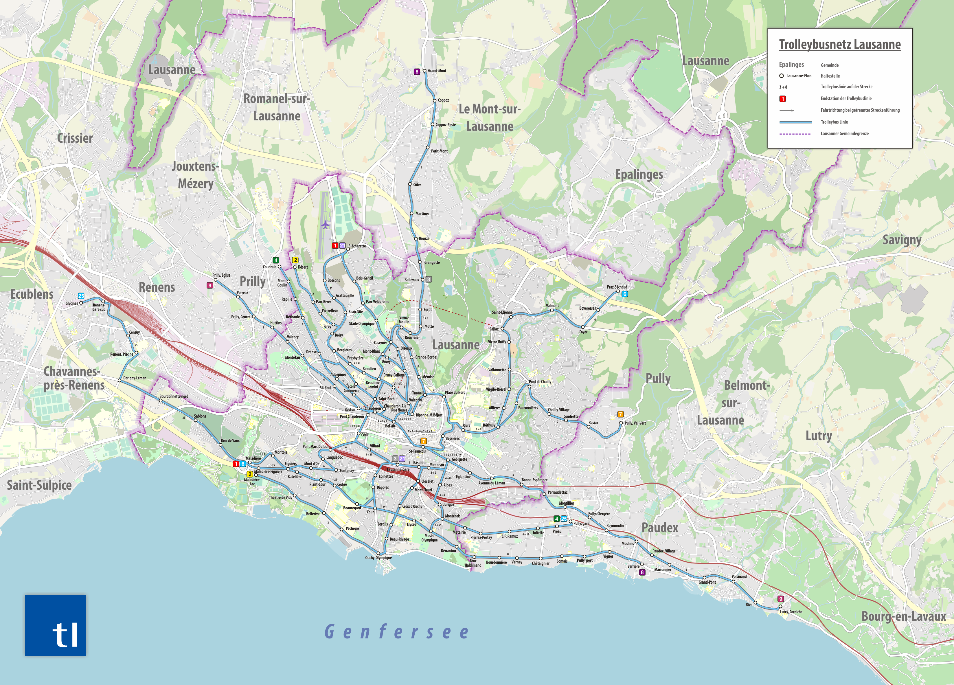 Trolleybusnetzplan des Transports publics de la région lausannoise (TL), ab 15. Dezember 2019